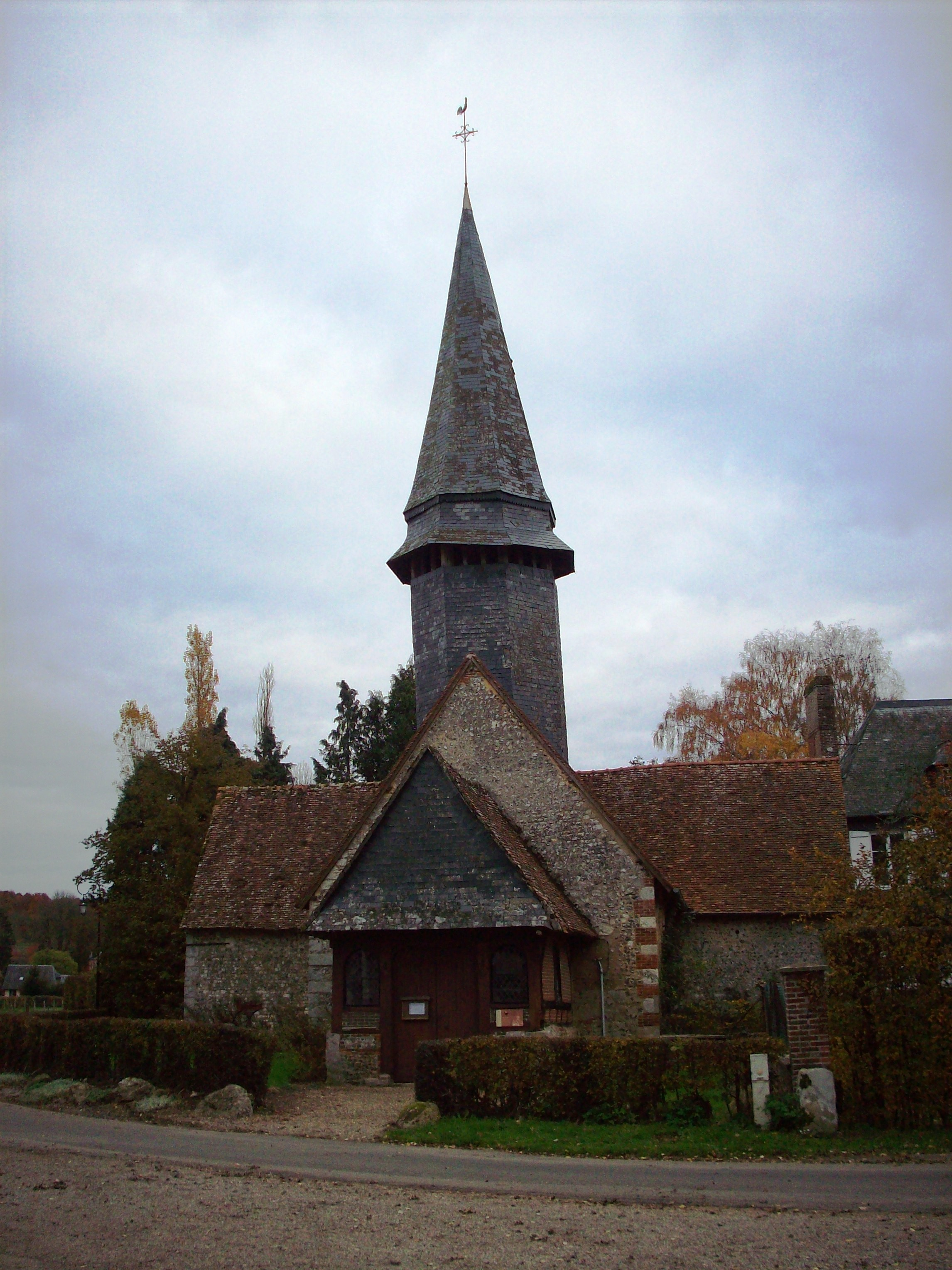 Eglise Saint-Martin de Lorleau.